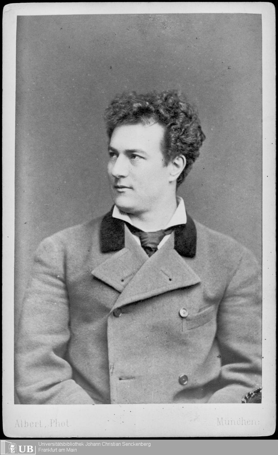 Hilmar Knorr, Brustbild